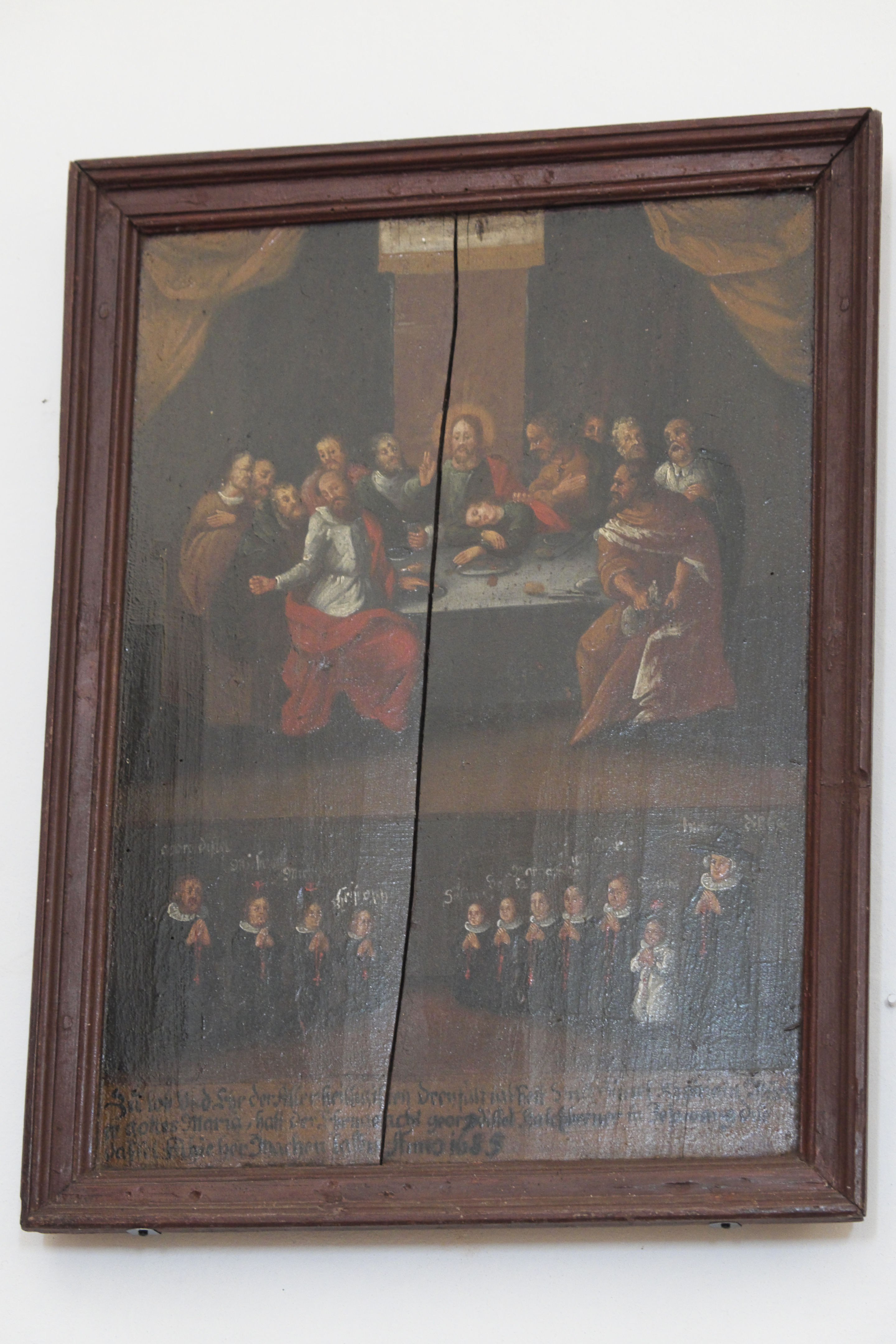 Katholische Filialkirche St. Maria (Maria Himmelfahrt) in Bergkirchen (Jesenwang) im Landkreis Fürstenfeldbruck (Bayern/Deutschland), Votivbild von 1685